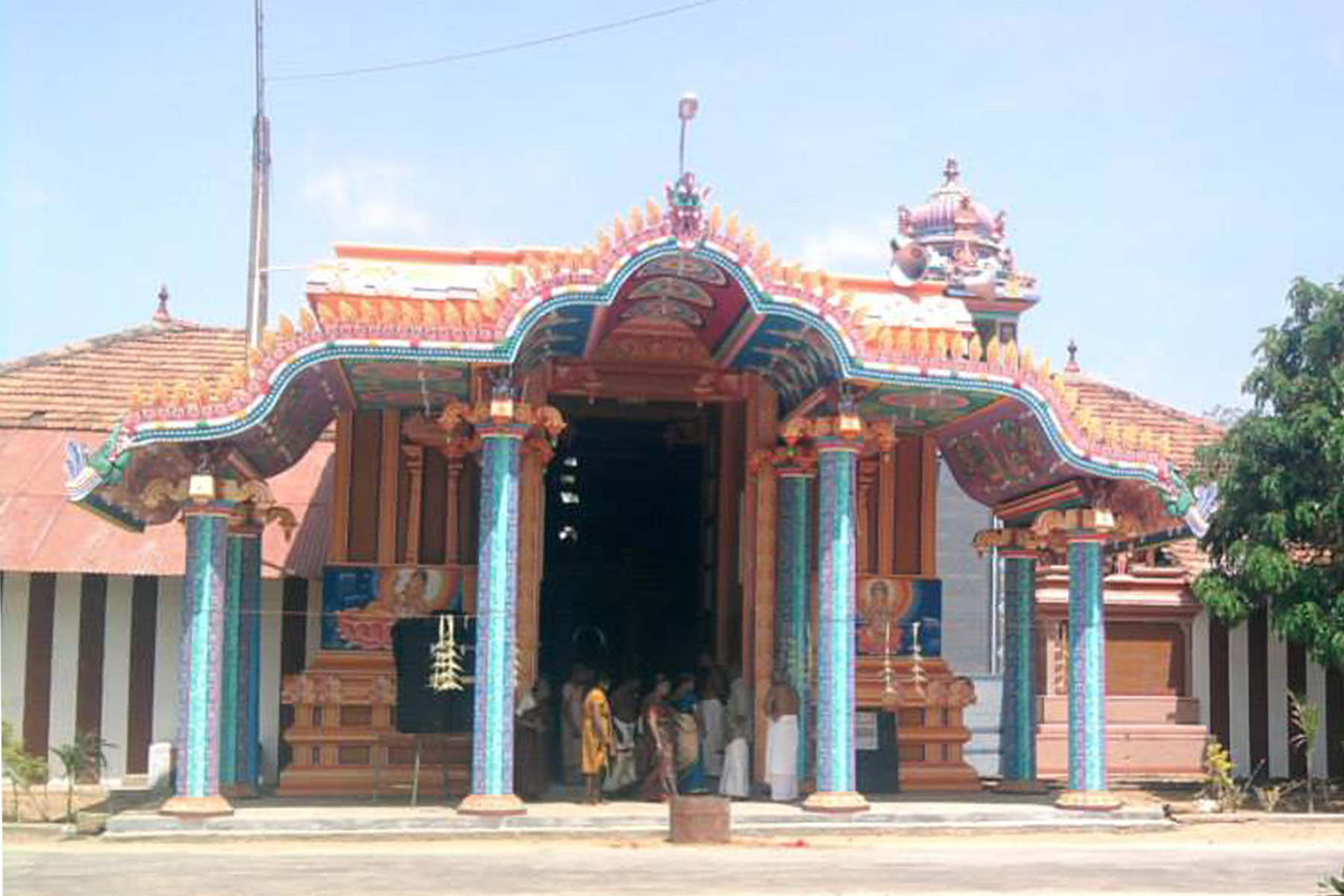 ஆலயத்தின் முகப்புத் தோற்றம்